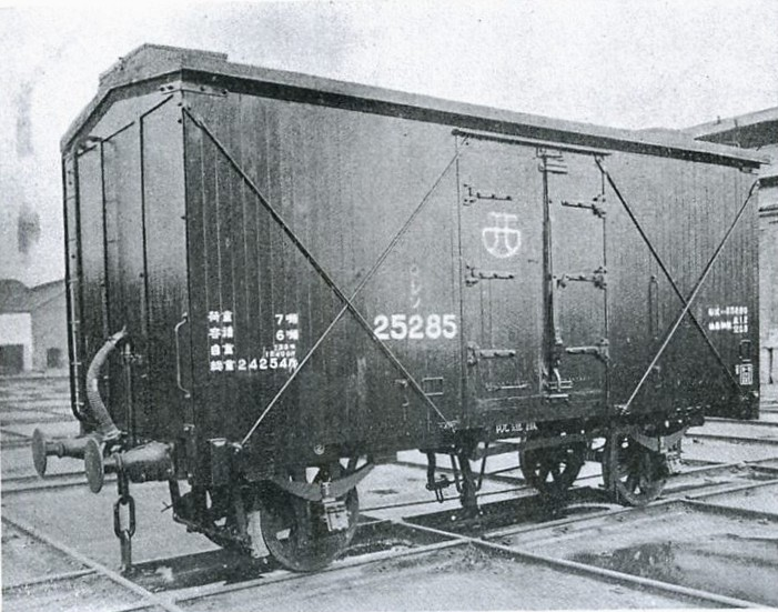 レソ25280形25285。大正7年(1918年)頃。